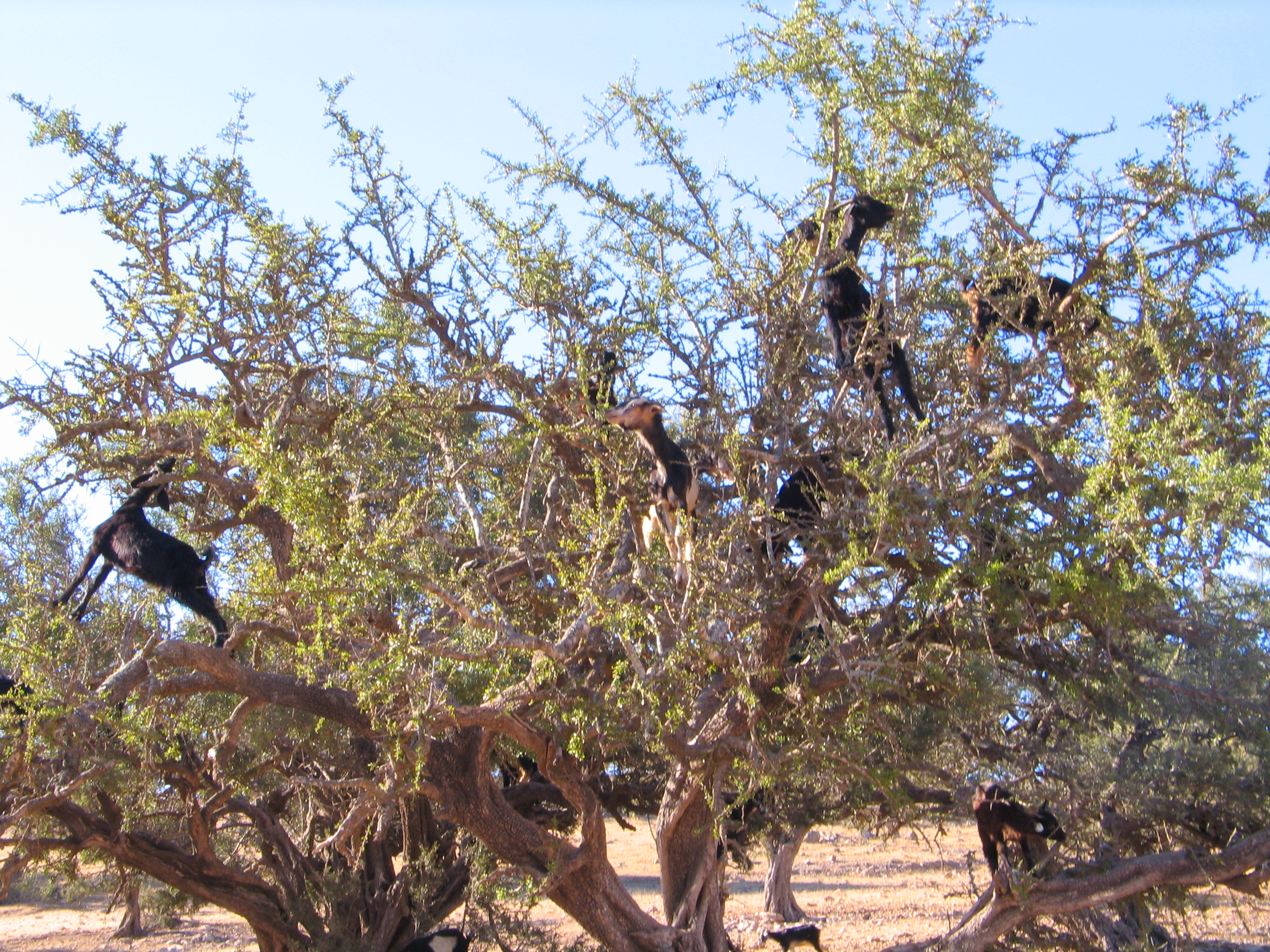 Essaouira (Maroc), les chèvres dans les arganiers